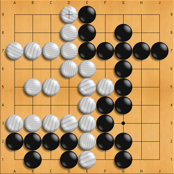 Yo soy el autor (self made).